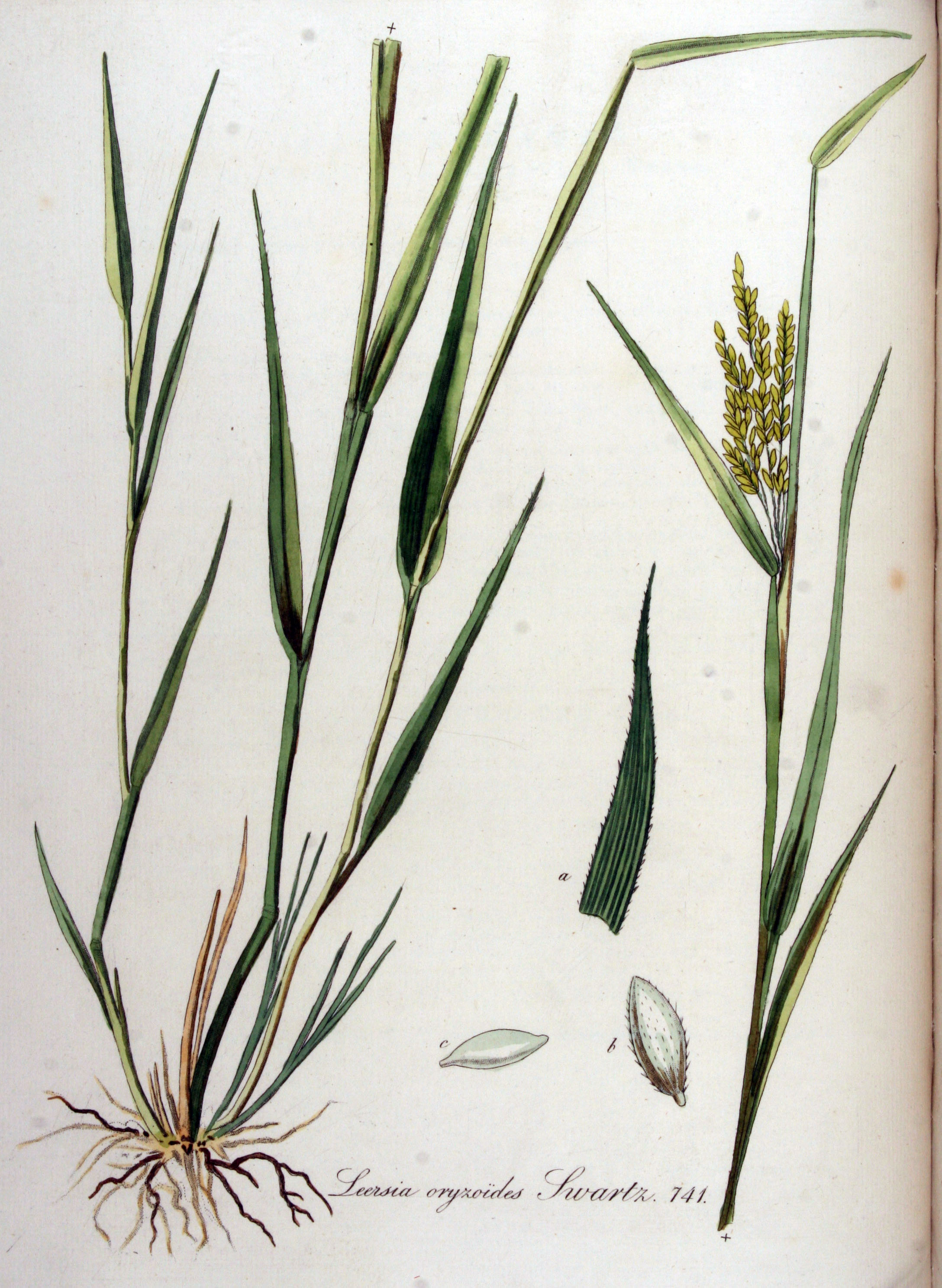 Leersia oryzoides (L.) Swartz